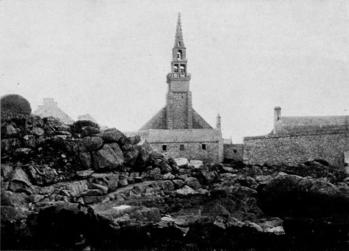 "Église gothique bâtie sur la grève, à Porspoder (Finistère)", photographie de Paul Gruyer, revue "L'Art et les artistes", mars 1924)